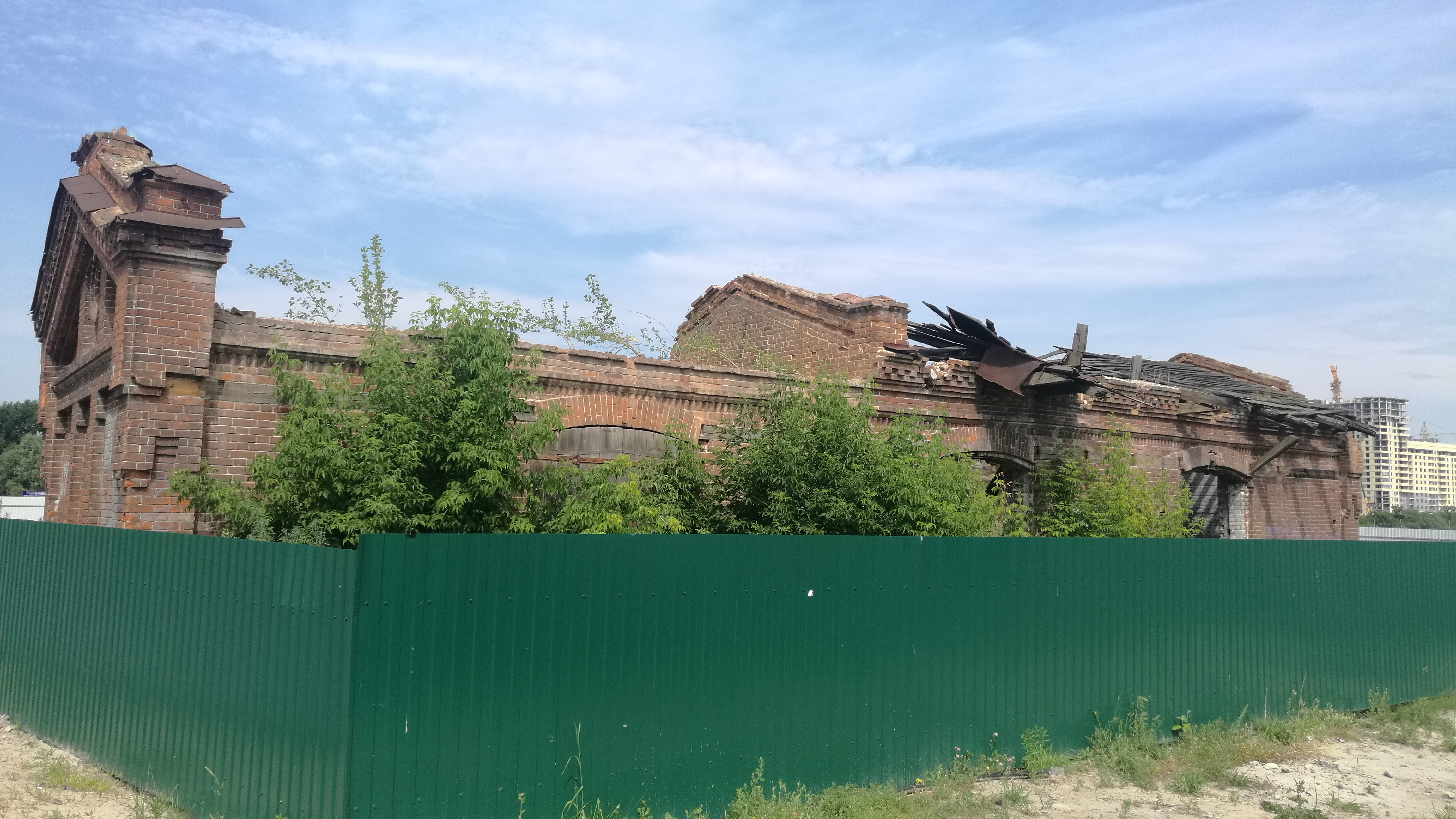 Detruita konstruaĵo en la kajo de rivero Turo. Tjumeno, Rusio.